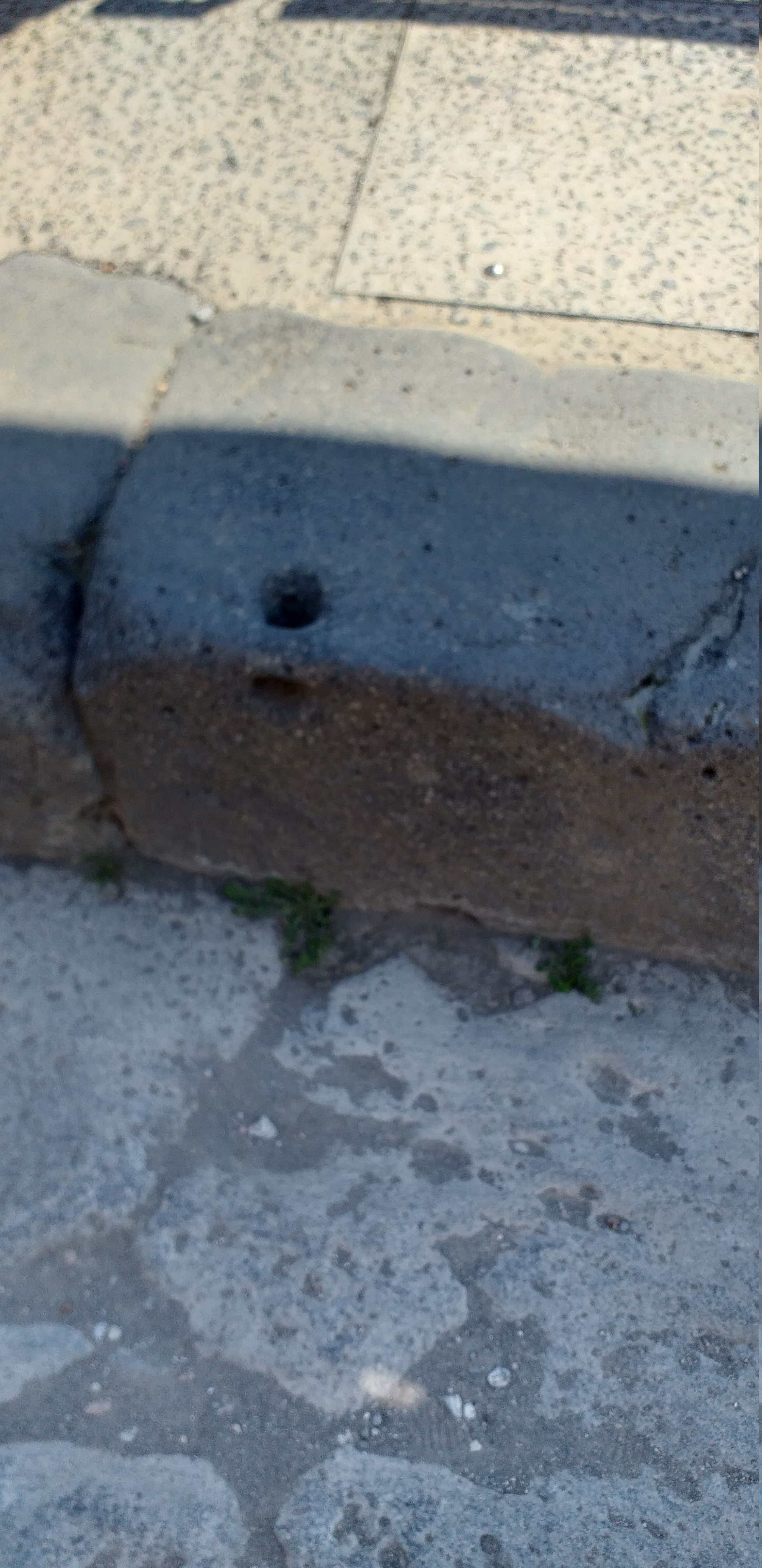 A hole in a street curb in Pompei used to tie a cart.